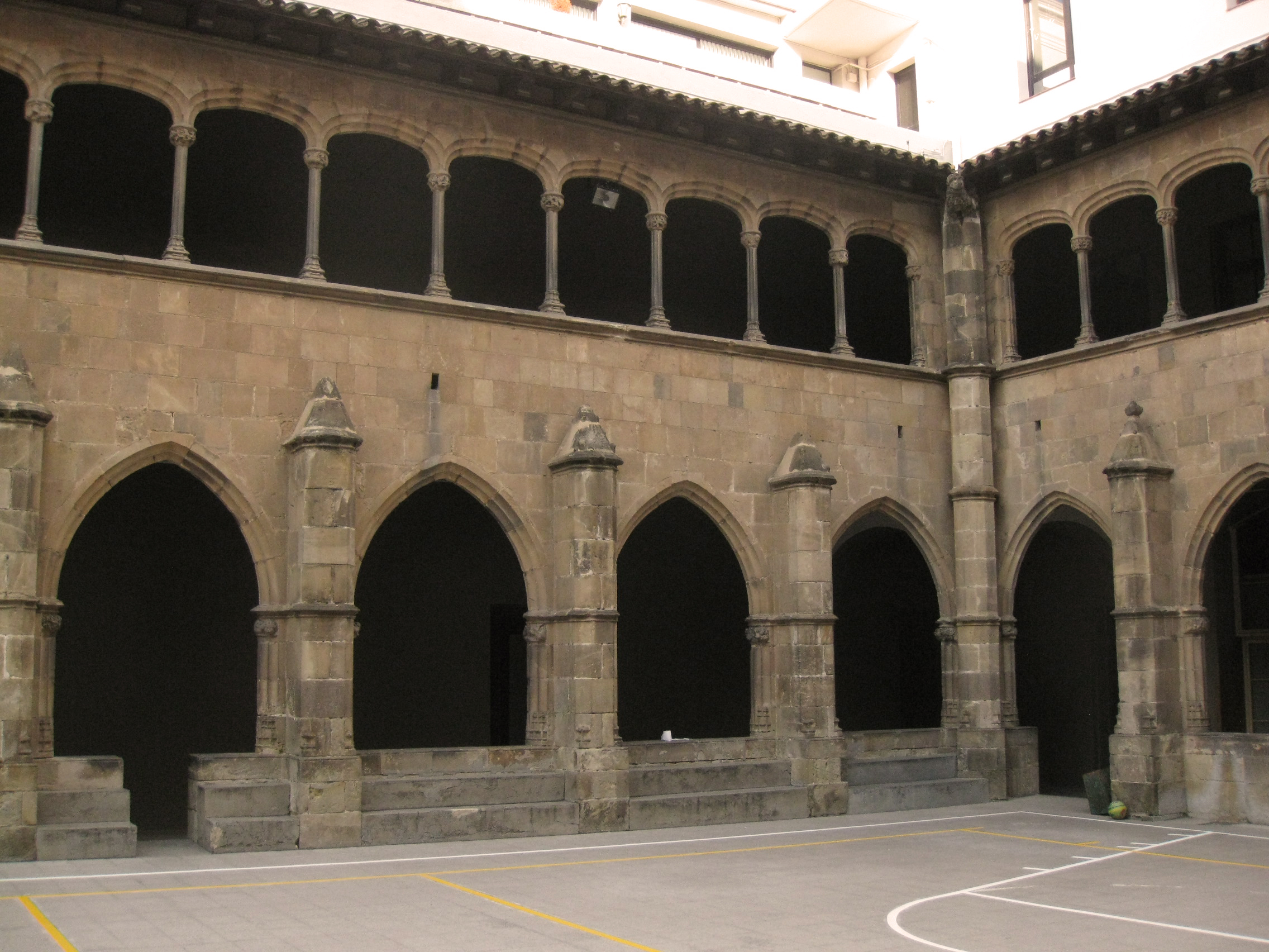 Claustre de l'antic convent de Santa Maria de Jerusalem, del segle XV, traslladat al col·legi Sant Miquel (cantonada dels carrers de Rosselló i Muntaner, Barcelona) el 1885. Només són originals del claustre antic les arqueries inferiors, la resta (la coberta, els forjats plans, les parets interiors i les arcades superiors) són de l'època de construcció del nou edifici.